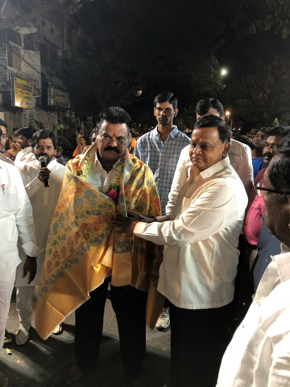 Sadar Chairman Salandri Parshuram Yadav